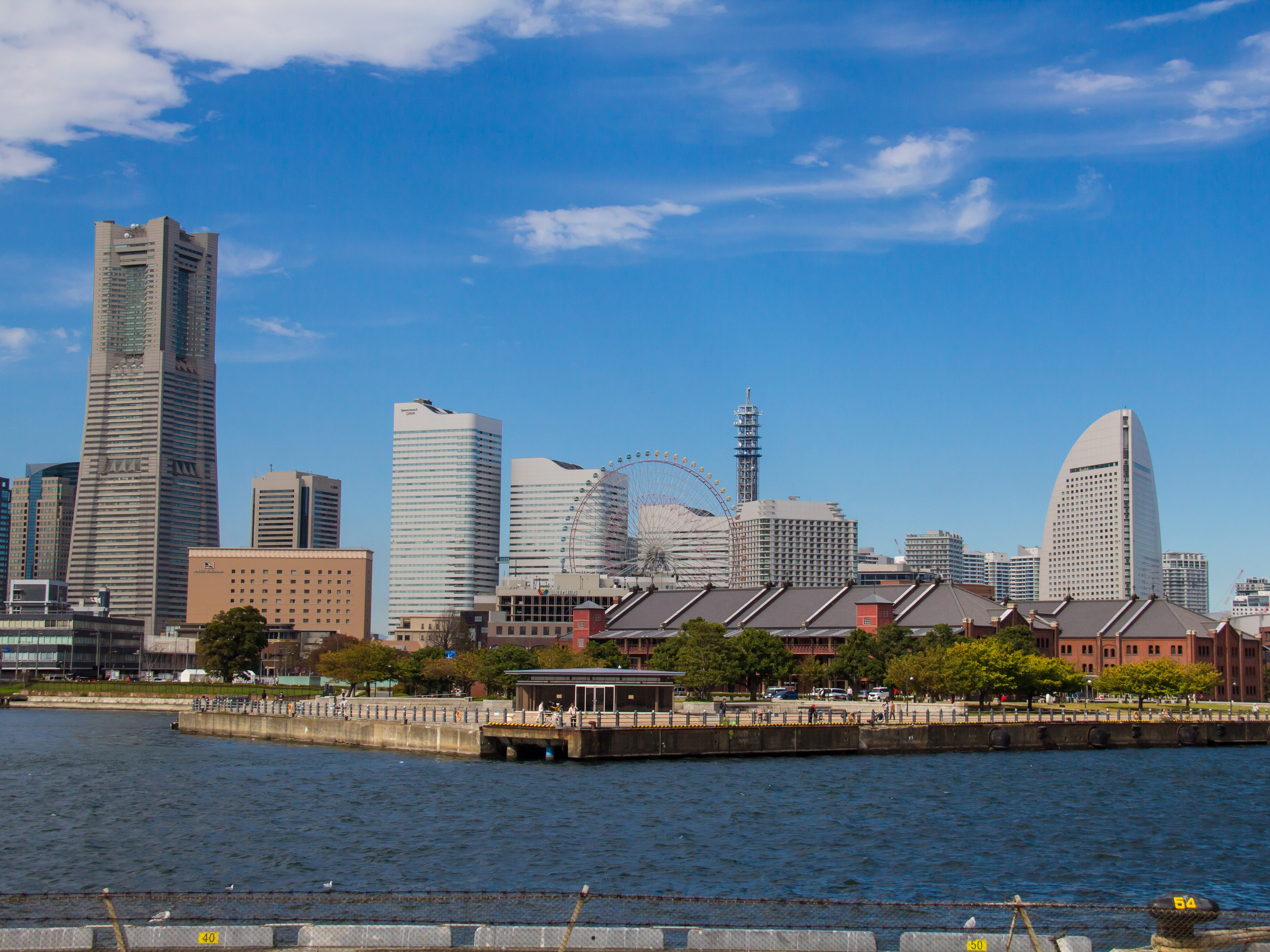 みなとみらい２１全景